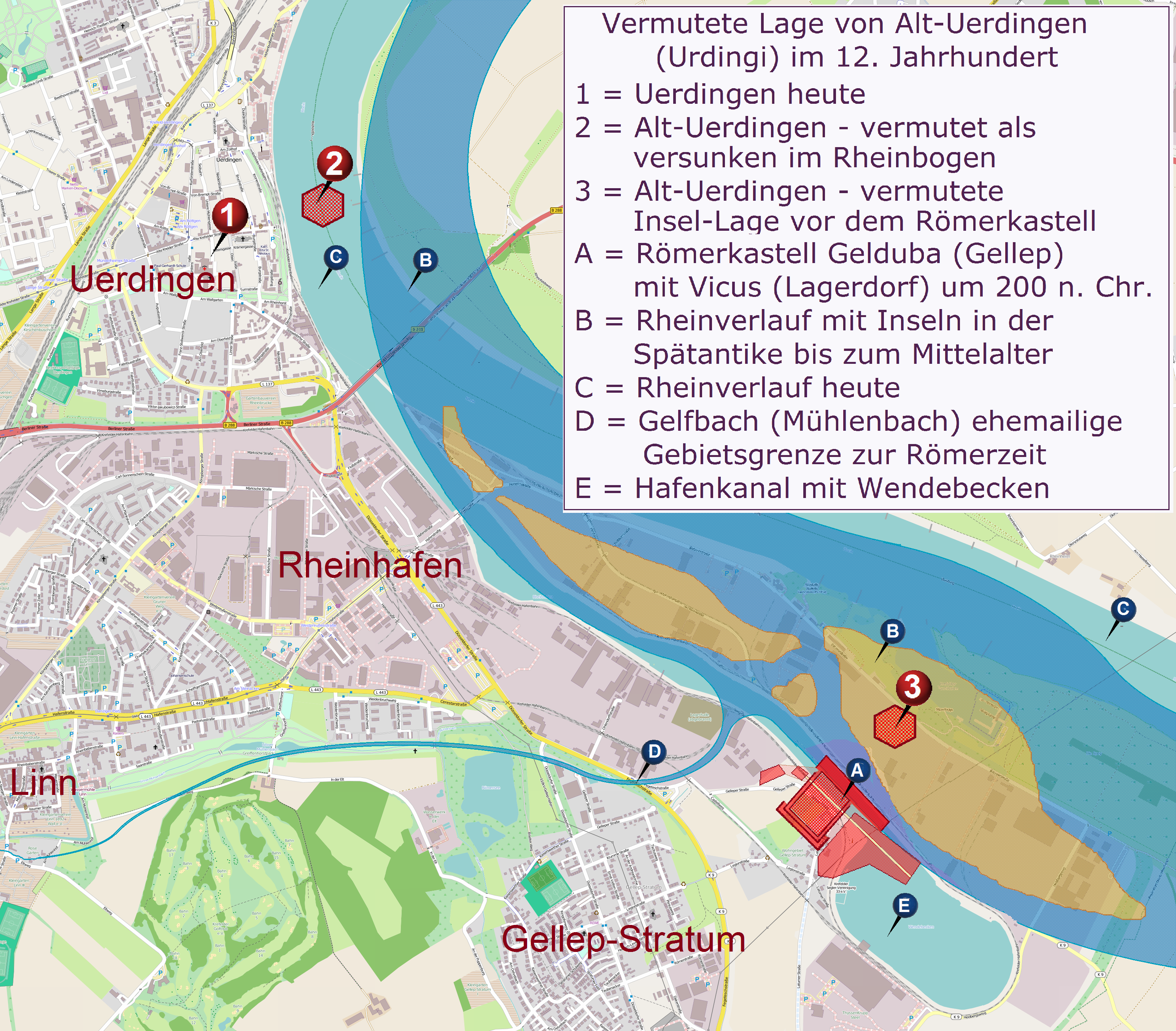 (1) = Uerdingen heute / Alt-Uerdingen bis 1284: (2) = vermutete Lage im jetzigen Rheinbett; (3) = vermutete Lage beim Römerkastell Gellep This map of Alt-Uerdingen Lage im Mittelalter was created from OpenStreetMap project data, collected by the community. This map may be incomplete, and may contain errors. Don't rely solely on it for navigation.